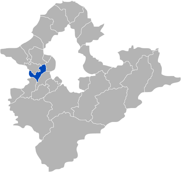 KaurJmeb為編寫台灣省台北縣新莊市，於2005年1月23日所繪製。